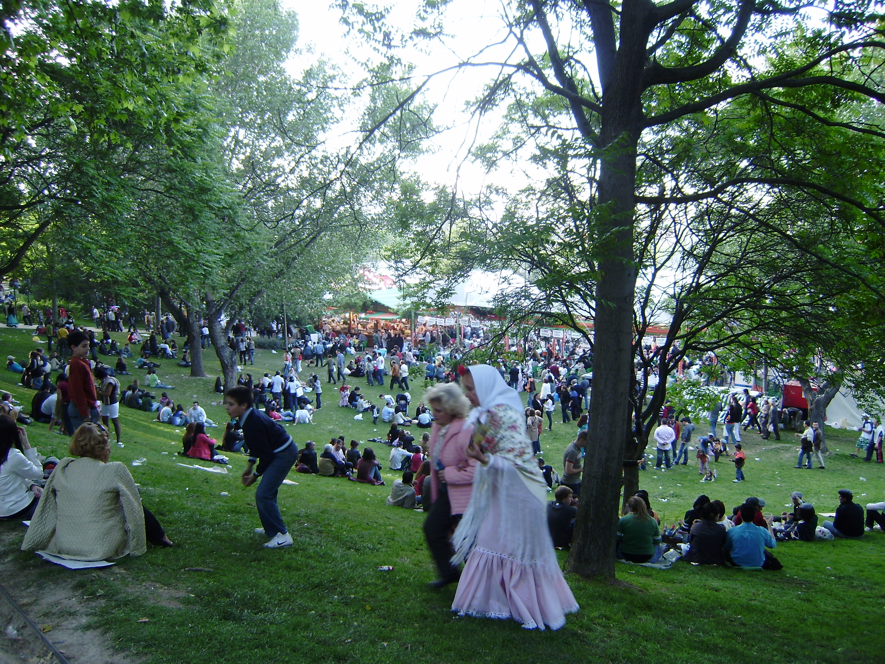 Gente en la pradera durante las fiestas de San Isidro